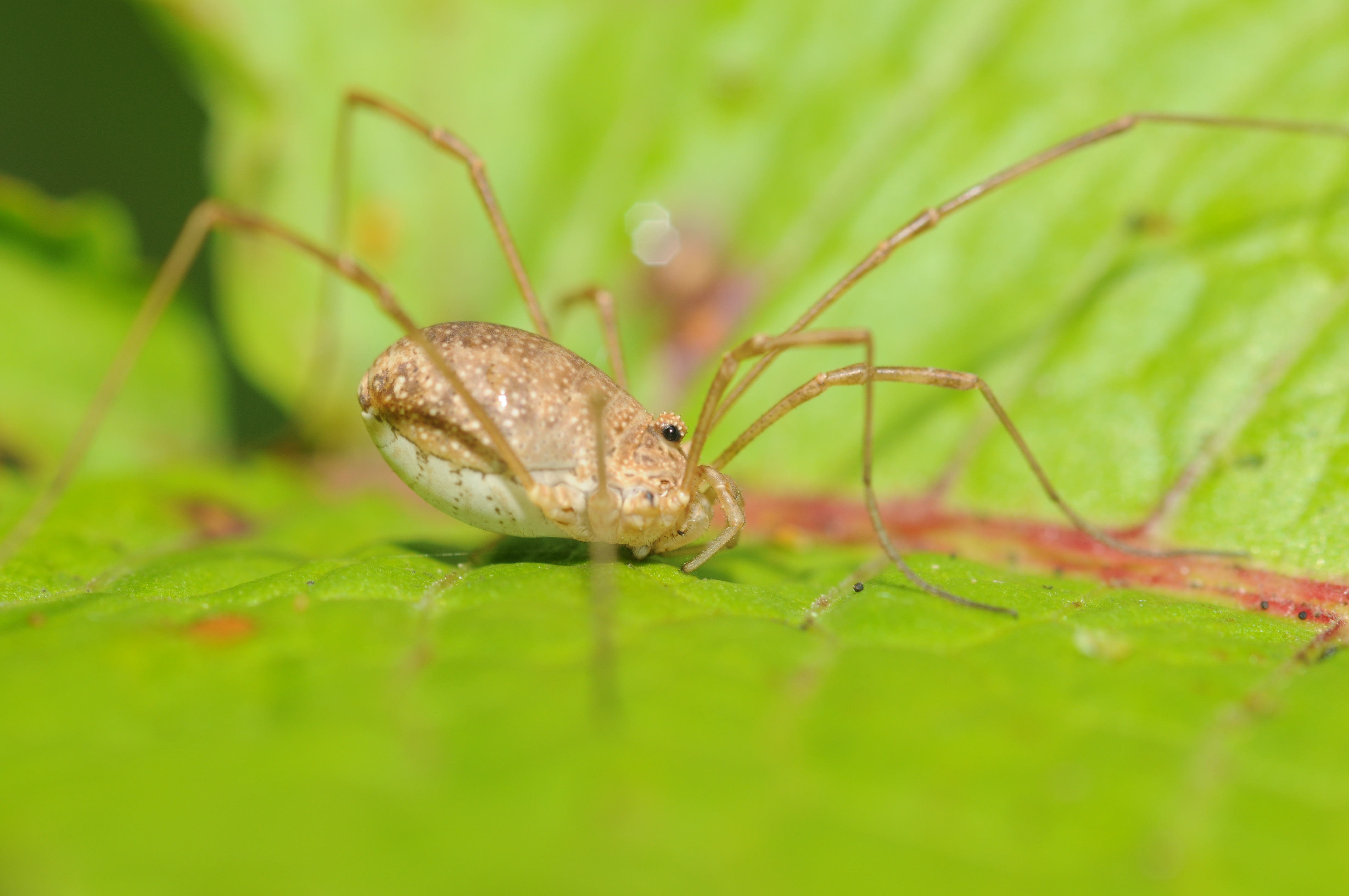 Opilion: Rilaena triangularis